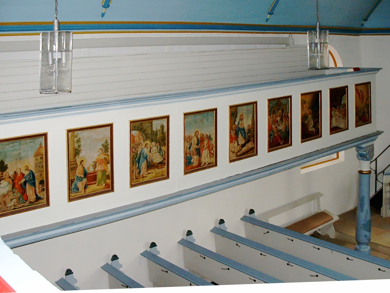 Evangelische Kirche Bruchweiler, Bilder an der Empore